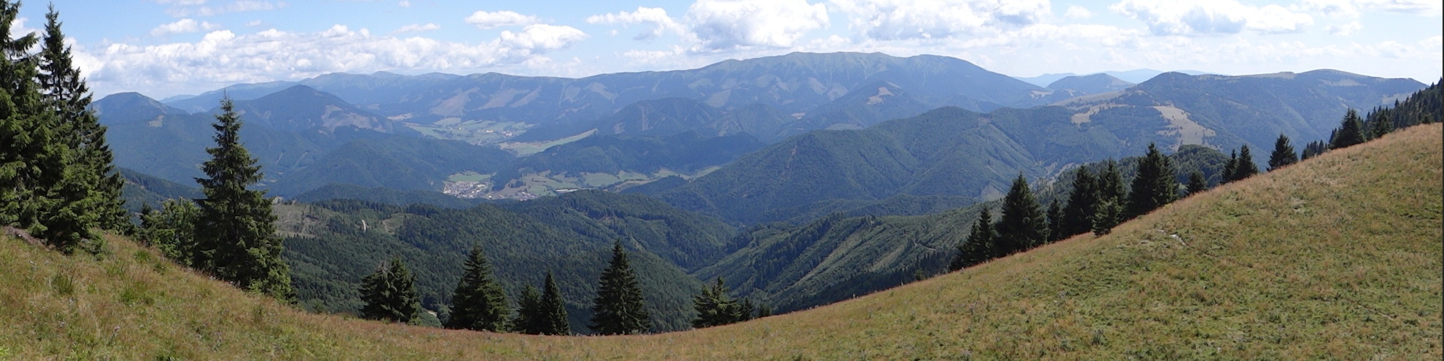 View from Severné Rakytovské sedlo